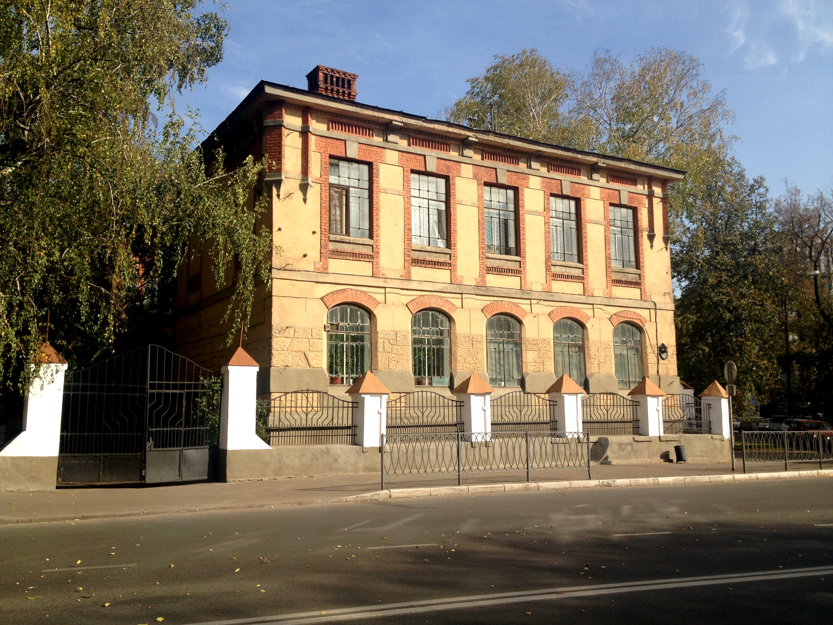 Здание психиатрической клиники: улица Волкова, 80 / улица Груздева, 14, Казань, Татарстан